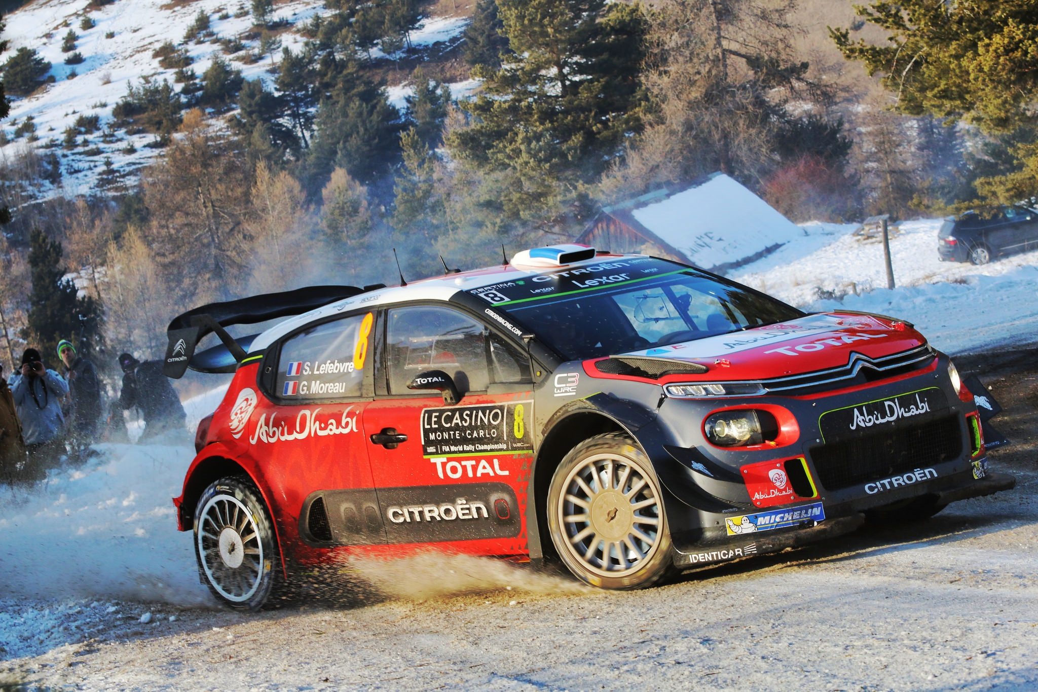 Stéphane Lefebvre i Gabin Moreau z zespołu Citroën Total Abu Dhabi WRT jadący Citroënem C3 WRC podczas Rajdu Monte Carlo 2017 roku